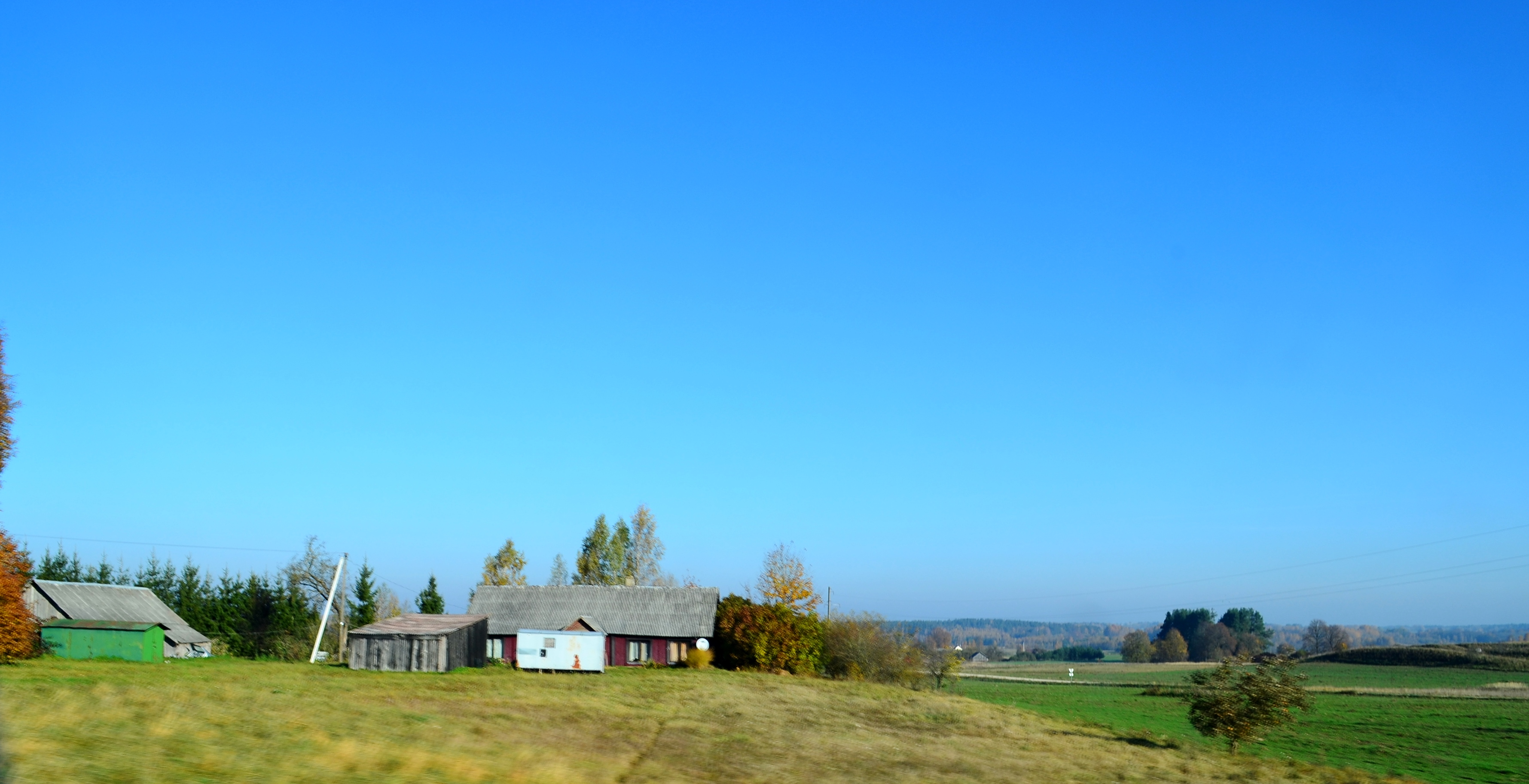 Duobužiai, Molėtų raj.